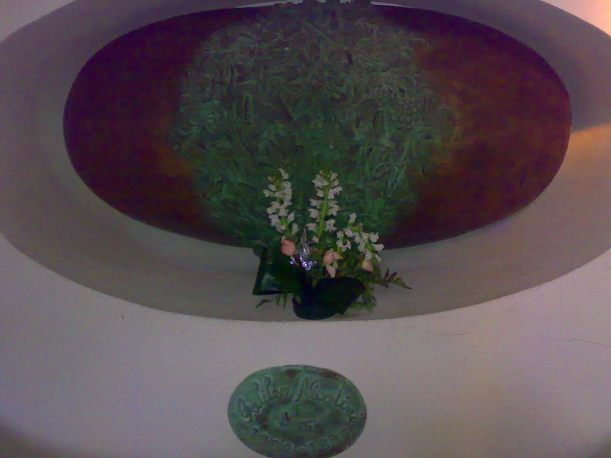 Urna bronzea del Venerabile Galileo Nicolini, opera dello scultore Tito Amodei.